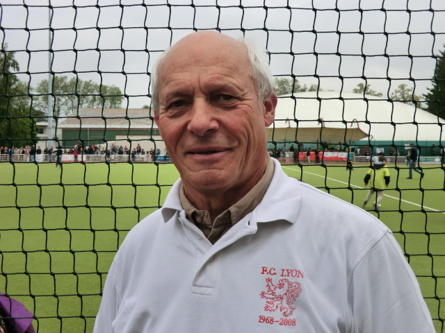 Bernard Arlin en marge de la finale du championnat de France 2013 à Caluire-et-Cuire.